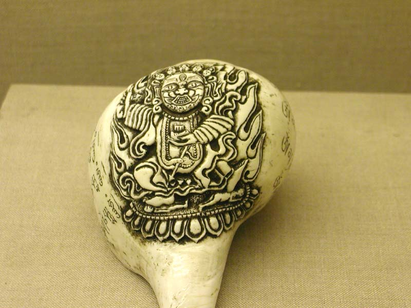 无包刻大黑天法螺 本文物为清代藏传佛教法器，为台湾收藏家王度收藏。大黑天梵名为Mahakala，又称为摩诃迦罗，本为印度教湿婆神（Siva ）化身，后成为密教的护法神。 2004年7月展出于北京大学赛克勒考古与艺术博物馆，User:Mountain2004年7月28日拍摄。拍摄者已授权依照GFDL协议发布该图像。